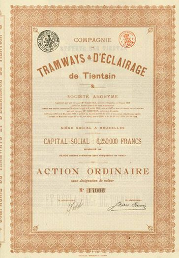 天津电车电灯股份有限公司股票